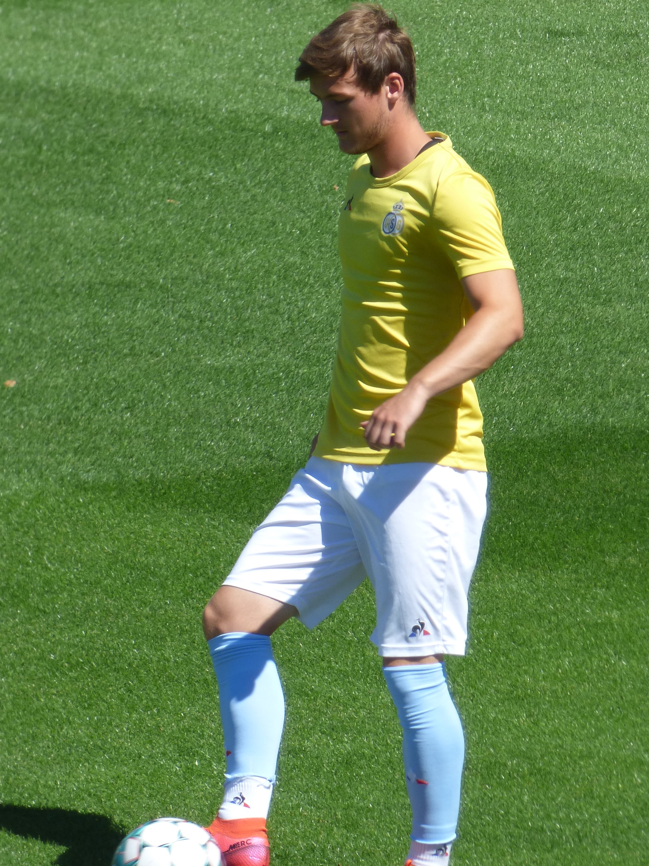 Charlie Brown lors du match amical RC Lens / Union Saint-Gilloise, le 5 août 2020, au Stade Paul-Guerre de Billy-Montigny.